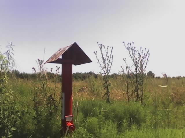 Sitio donde se erigía el Apeadero Km 38, Merlo.